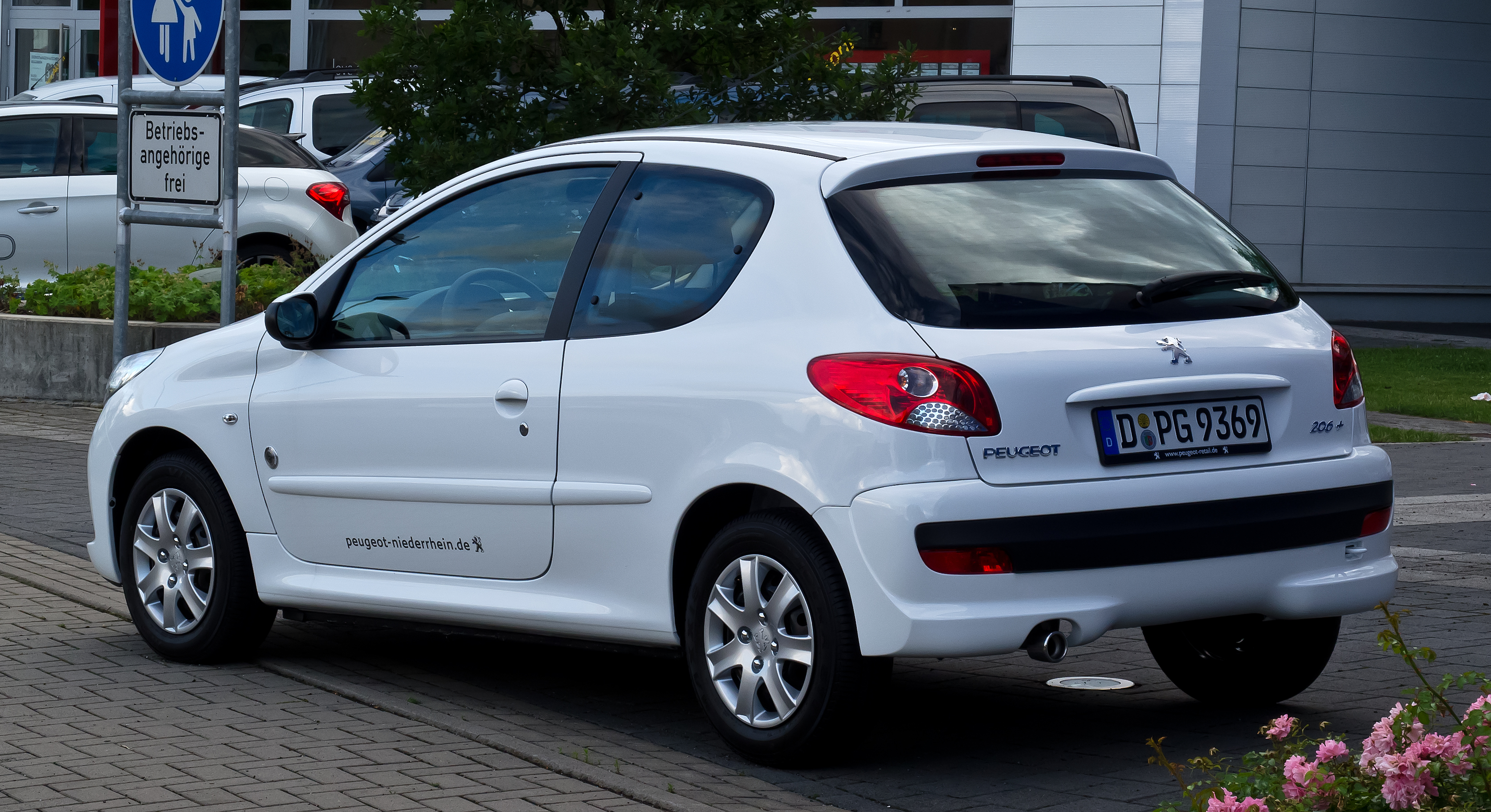 Peugeot 206+ 60 Generation